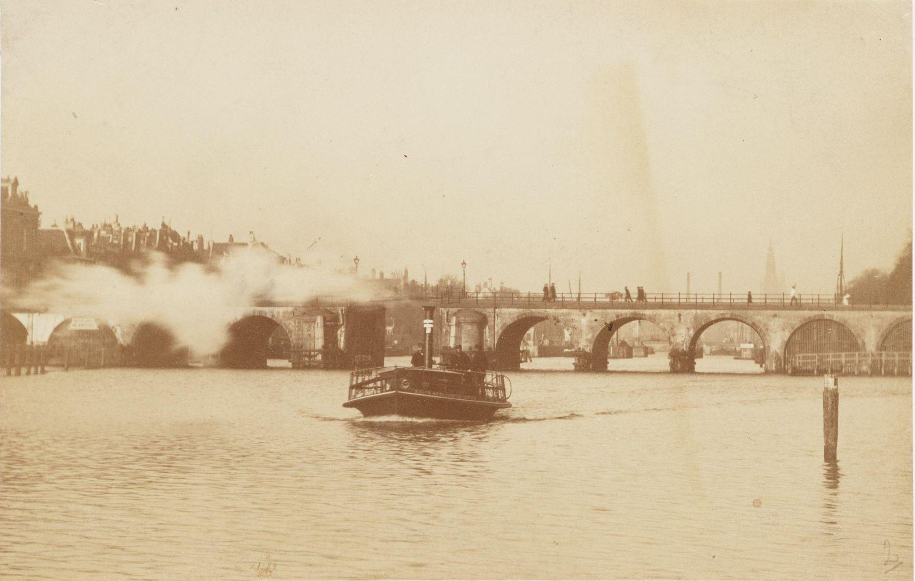 De Amstel gezien naar de Hogesluis, vóór de verbouwing van 1883 ten behoeve van de trambaan